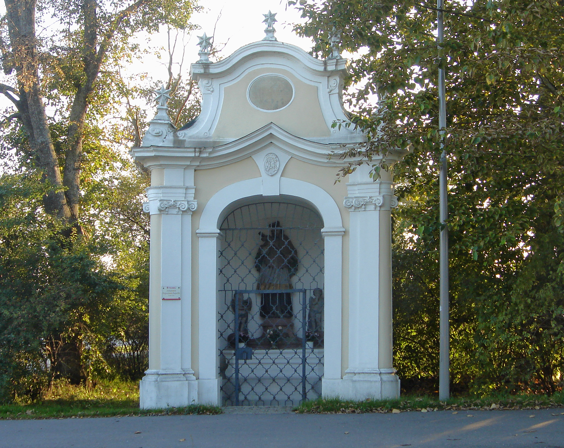 Neudörfl, Johannes-Nepumuk-Kapelle (1745)